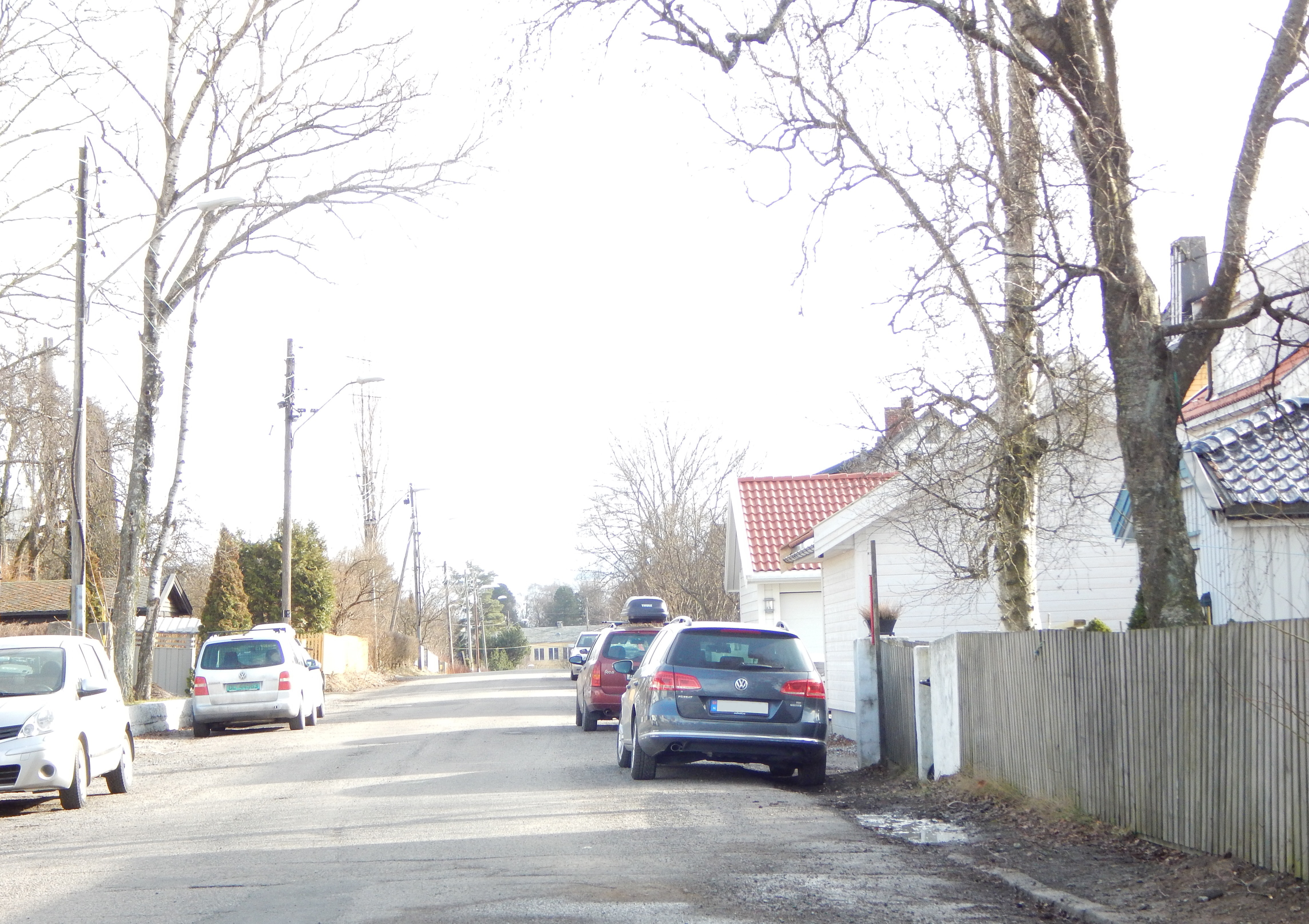 Fagerliveien på Disen i Oslo